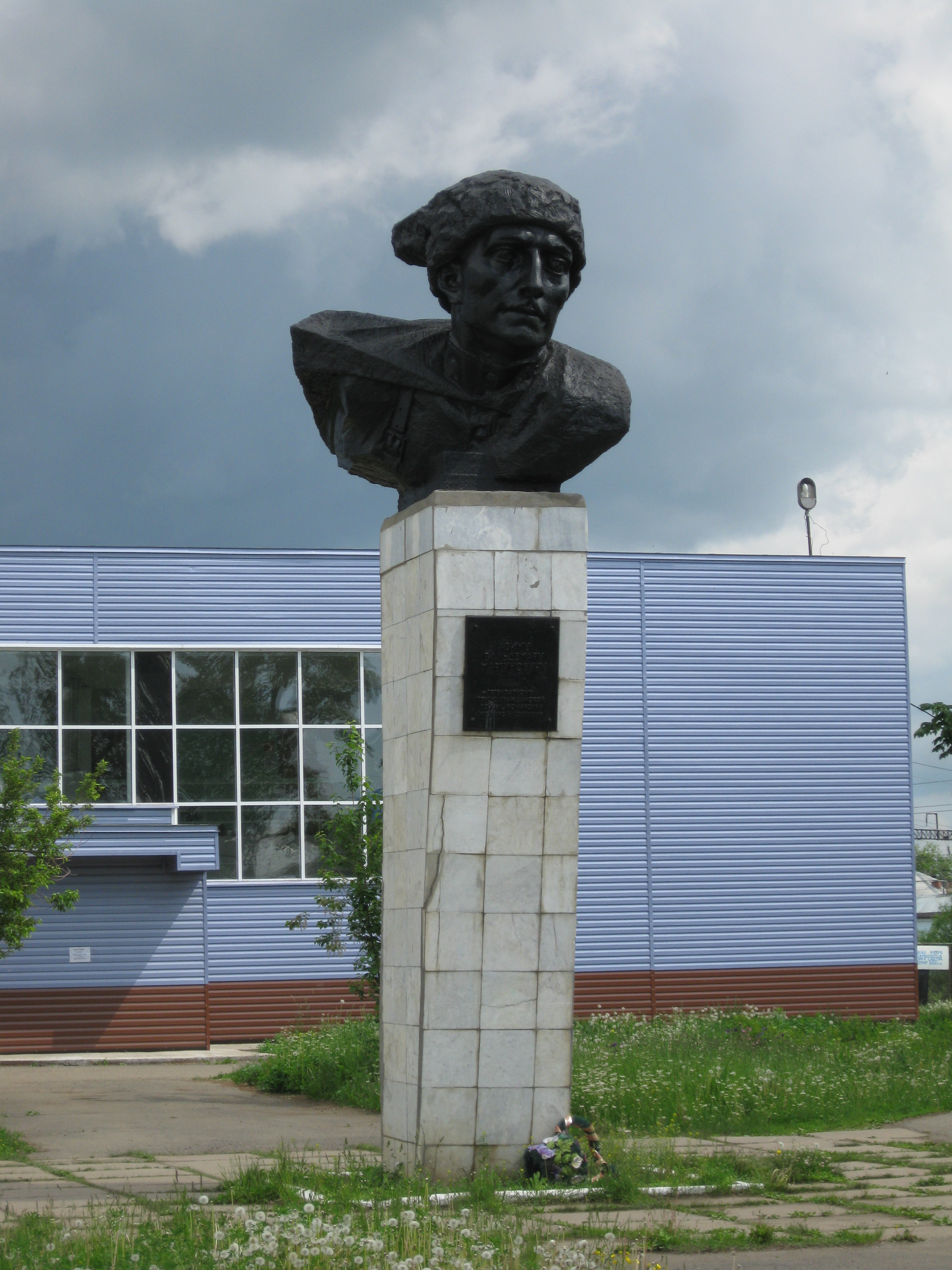 Бюст Владимира Мартиновича Азина в городе Чернушке Пермского края. Открыт 22 сентября 1979 года. Автор - Ю.П. Клещевников.